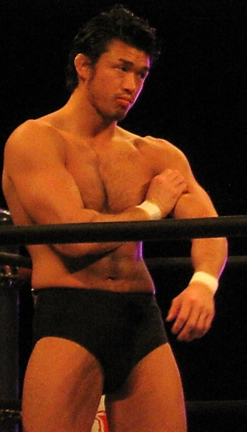 2015年3月22日 ベイコム総合体育館「Road to INVASION ATTACK 2015」柴田勝頼